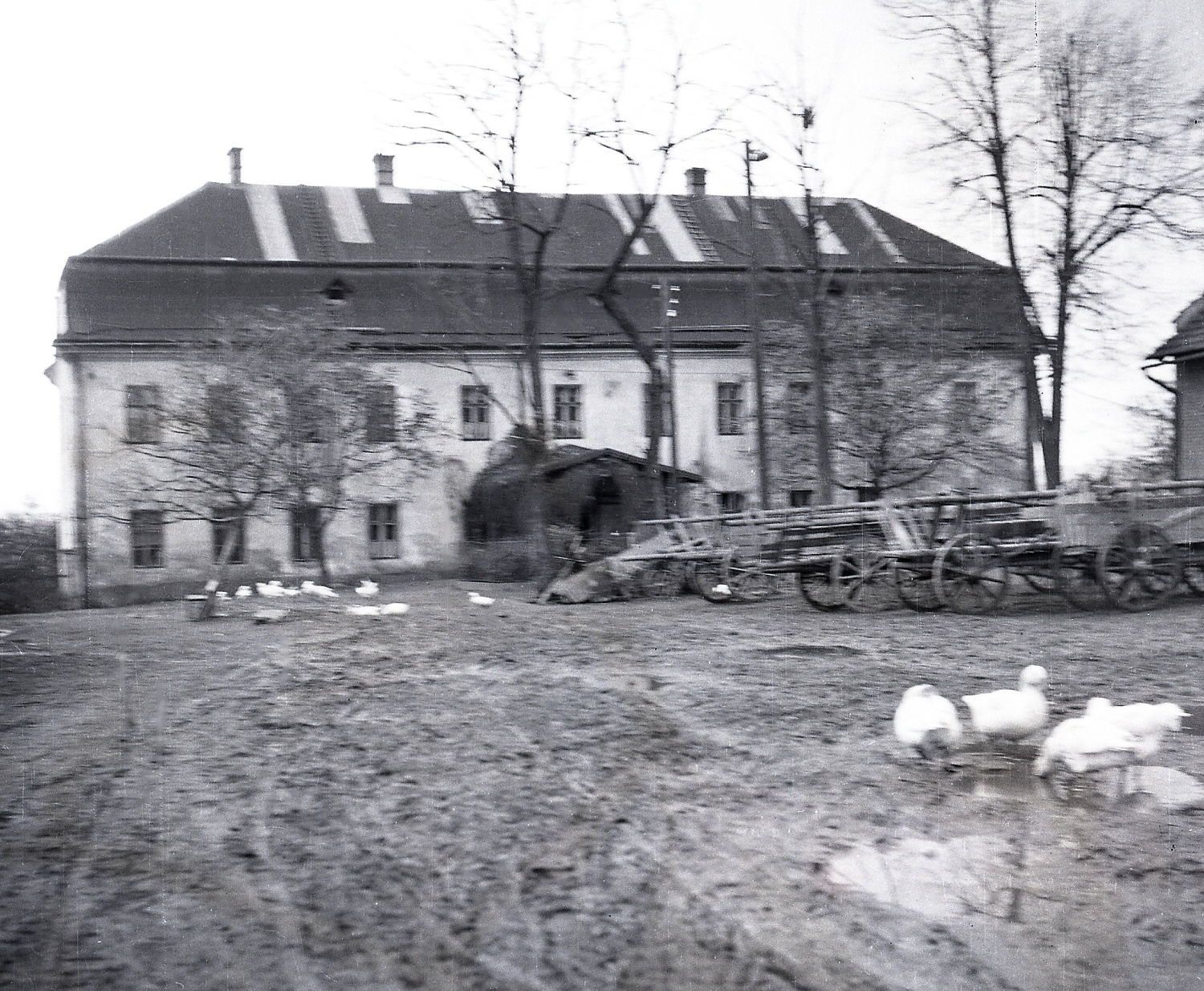 Tak vapadal havířovský zámek i se dvorem v době, kdy ještě fungoval jako farma státního statku v roce 1956.